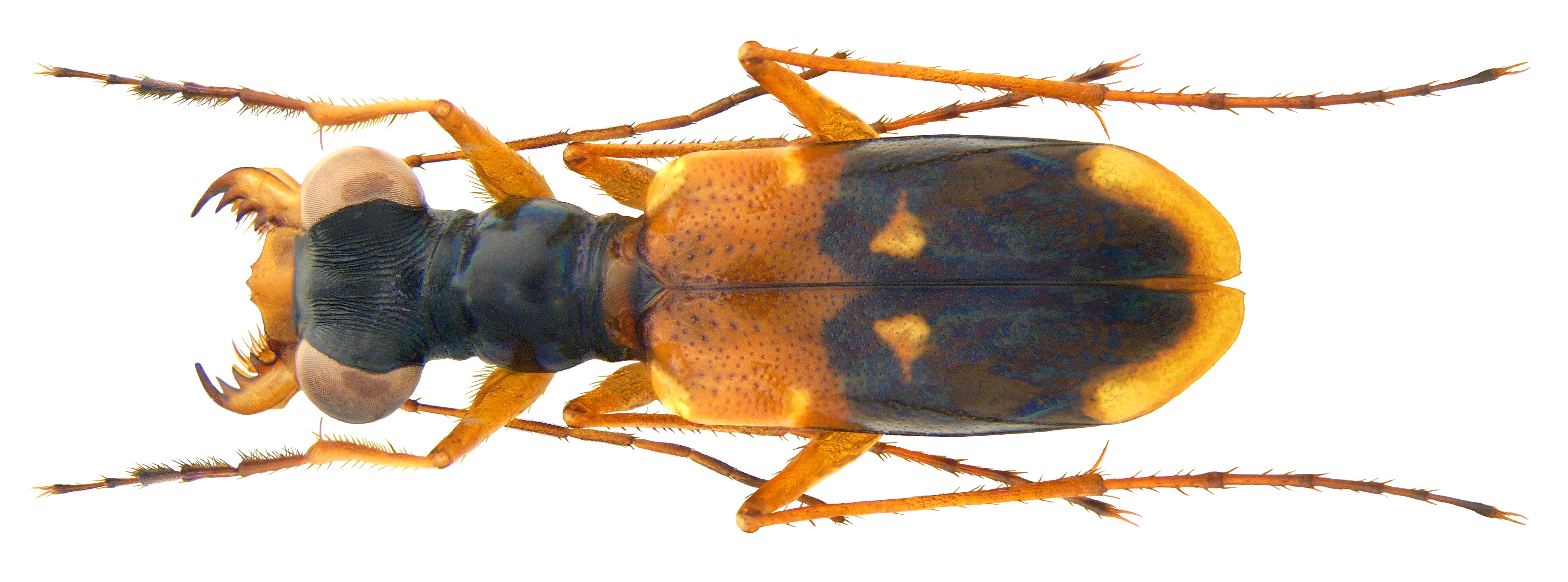 Familie: Carabidae Grösse: 11 mm Fundort: Indonesien, Sulawesi, Toboll leg. A.Skale, 2009; det. J.Wiesner, 2009 Foto: U.Schmidt, 2009